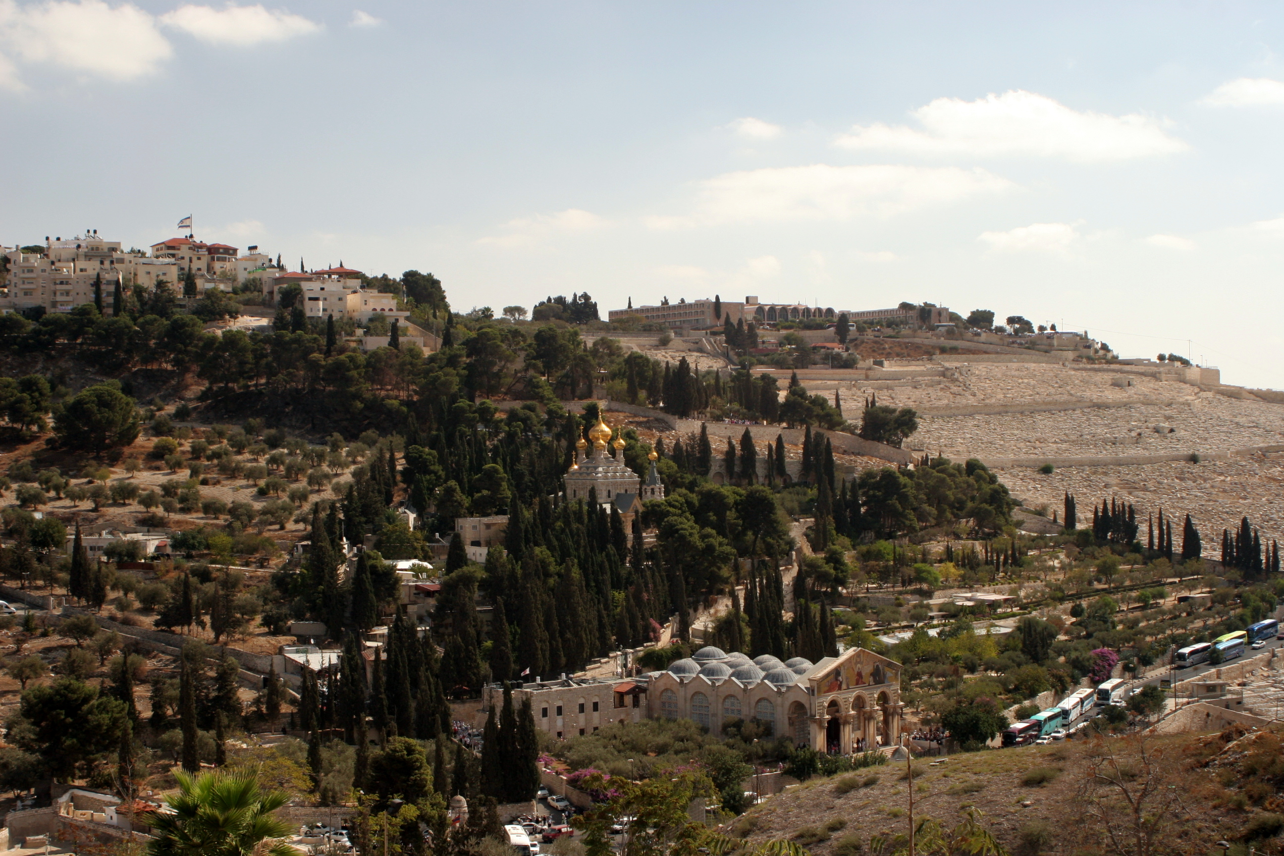 IMG_4588 Jerusalem